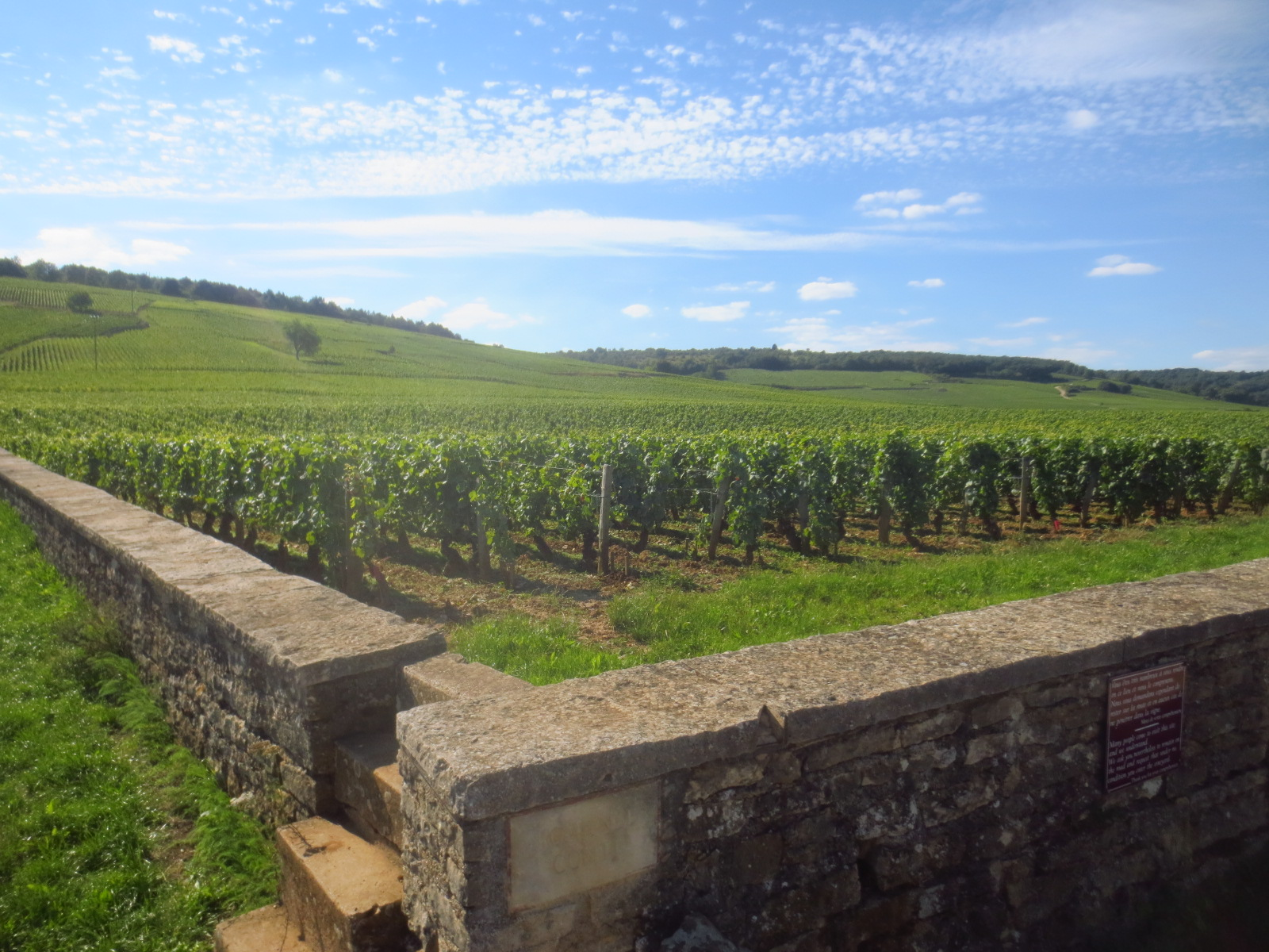 Vignoble de La Romanée-Conti à Vosne Romanée en Bourgogne